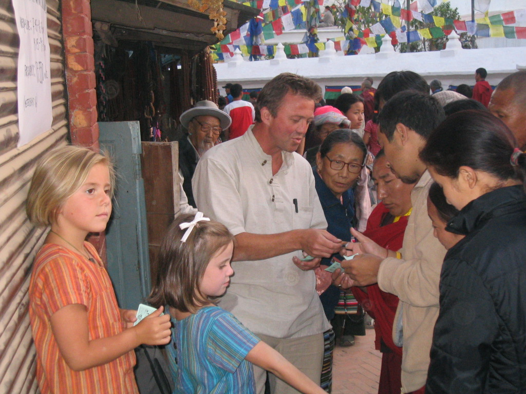 Øystein Alme in Kathmandu